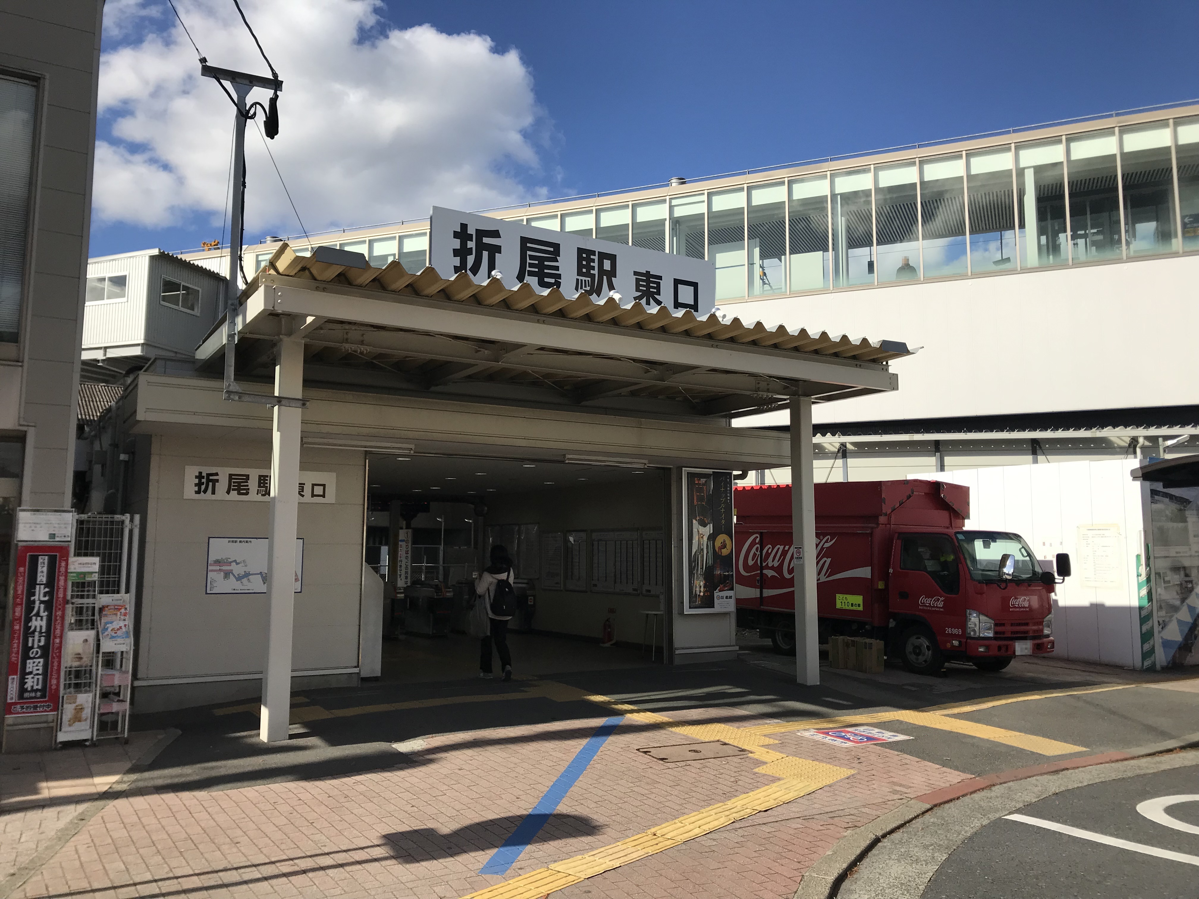 折尾駅東口